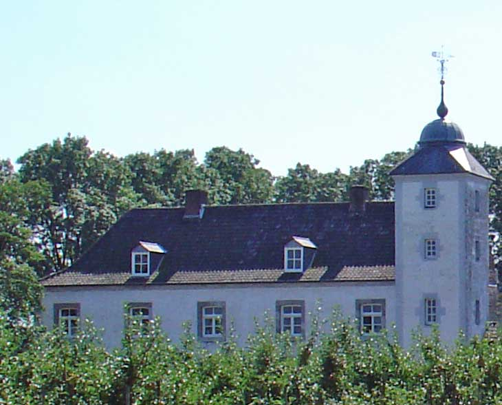 Kasteelhoeve Bockhof in Groot Haasdal bij Schimmert gemeente Nuth in Limburg